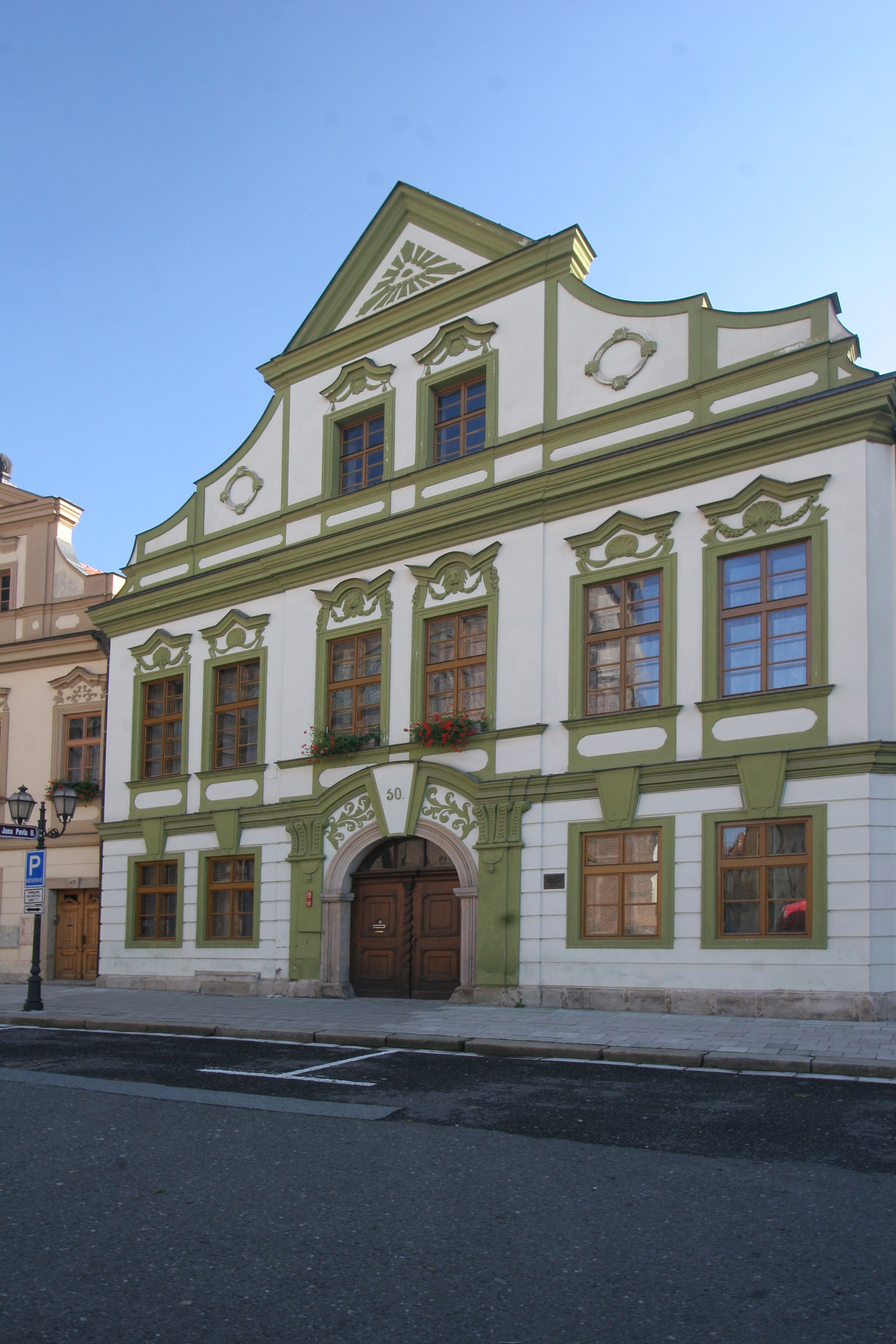 Rezidence kapitulního vikáře (Hradec Králové), nám. Jana Pavla II. 50/2, Hradec Králové